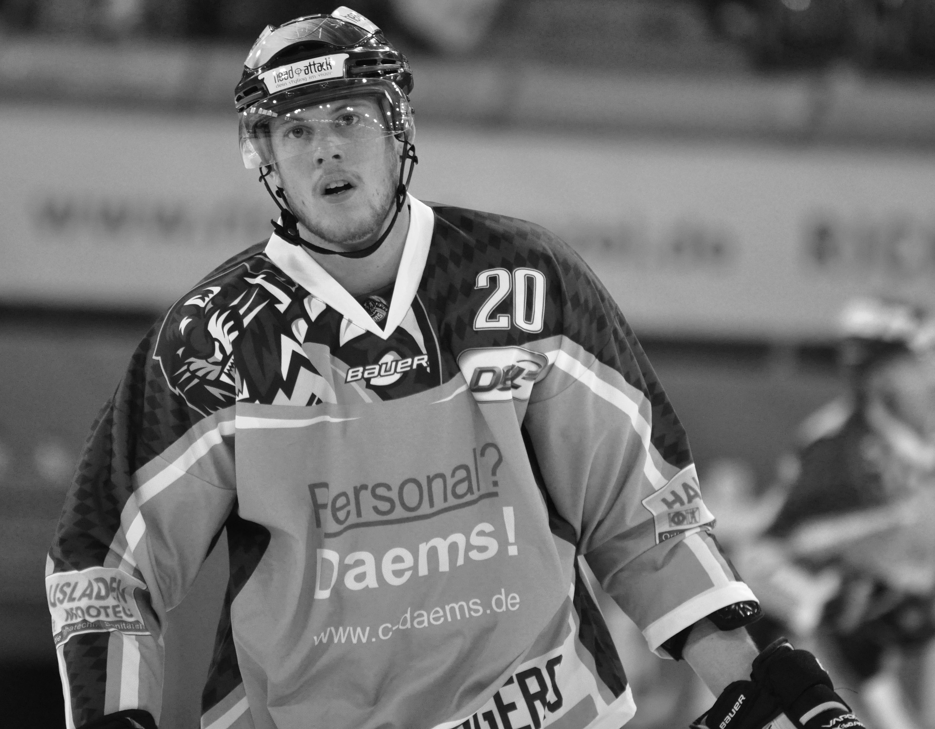 Straubing Tigers - Eisbären Berlin 07.04.2012 DEL PlayOff Halbfinale